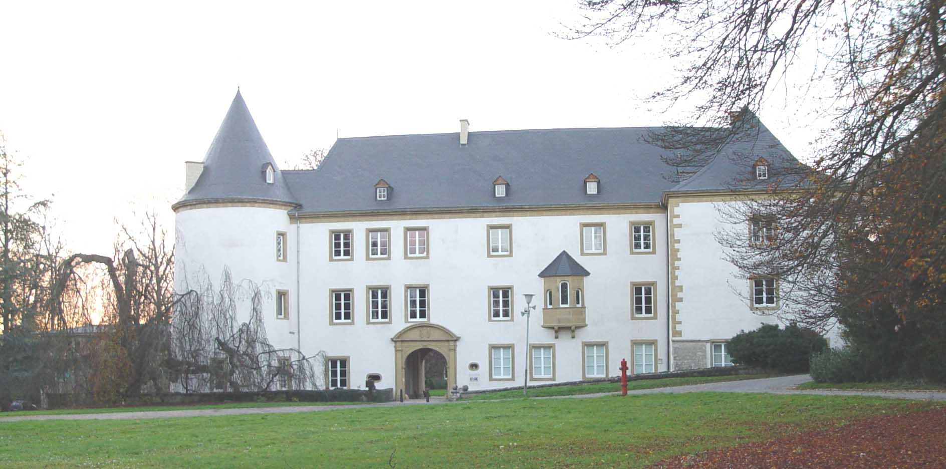 Sujet: Schlass zu Suessem Source: ege Photo (Cornischong) Lizenz: GFDL